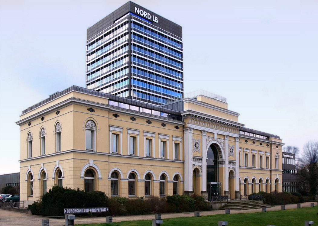 Braunschweigische Landessparkasse im Alten Bahnhof Braunschweig